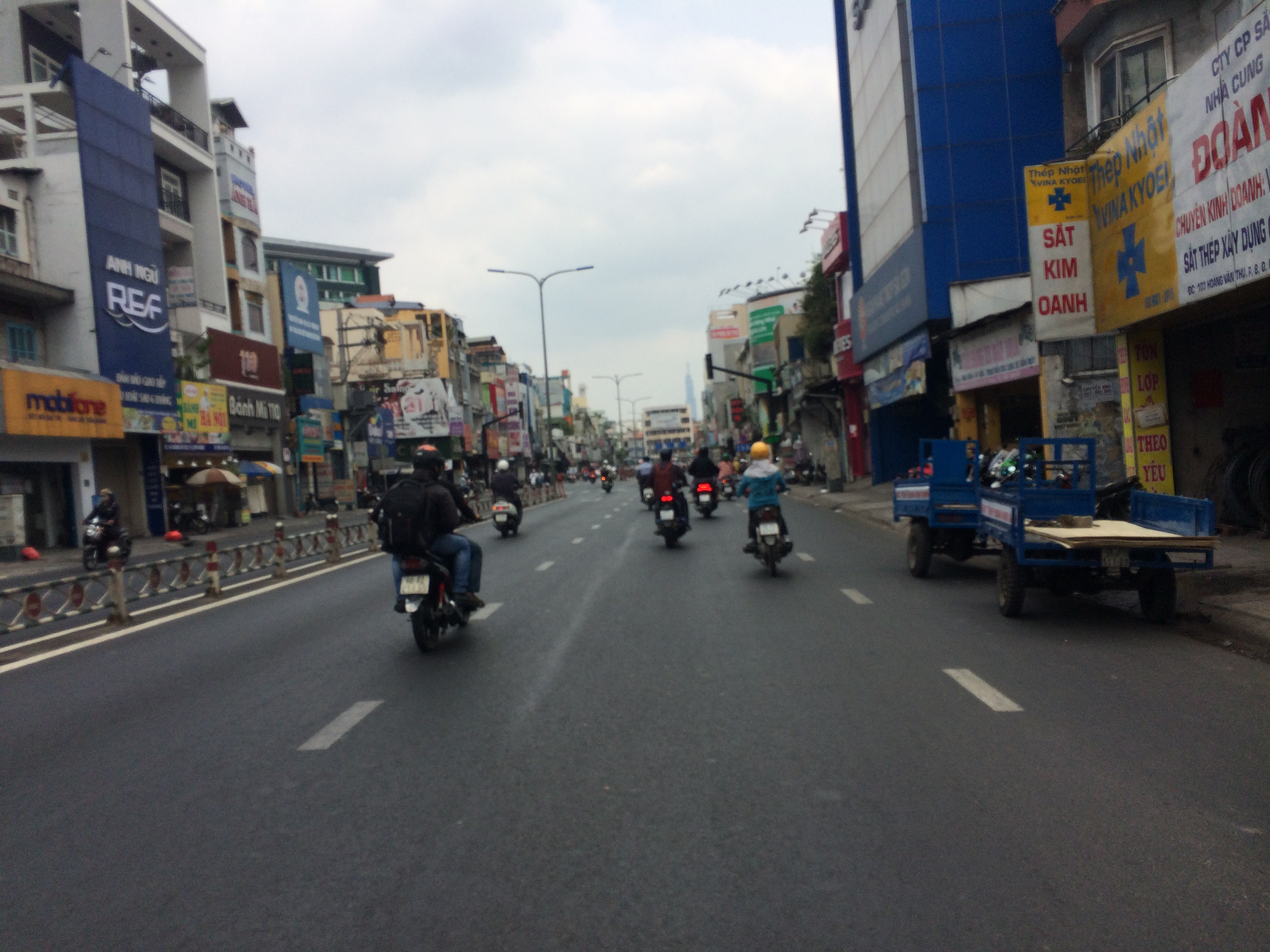 Đường Hoàng Văn Thụ, đoạn từ công viên Hoàng Văn Thụ đến ngã tư Phú Nhuận thuộc quận Phú Nhuận, Thành phố Hồ Chí Minh